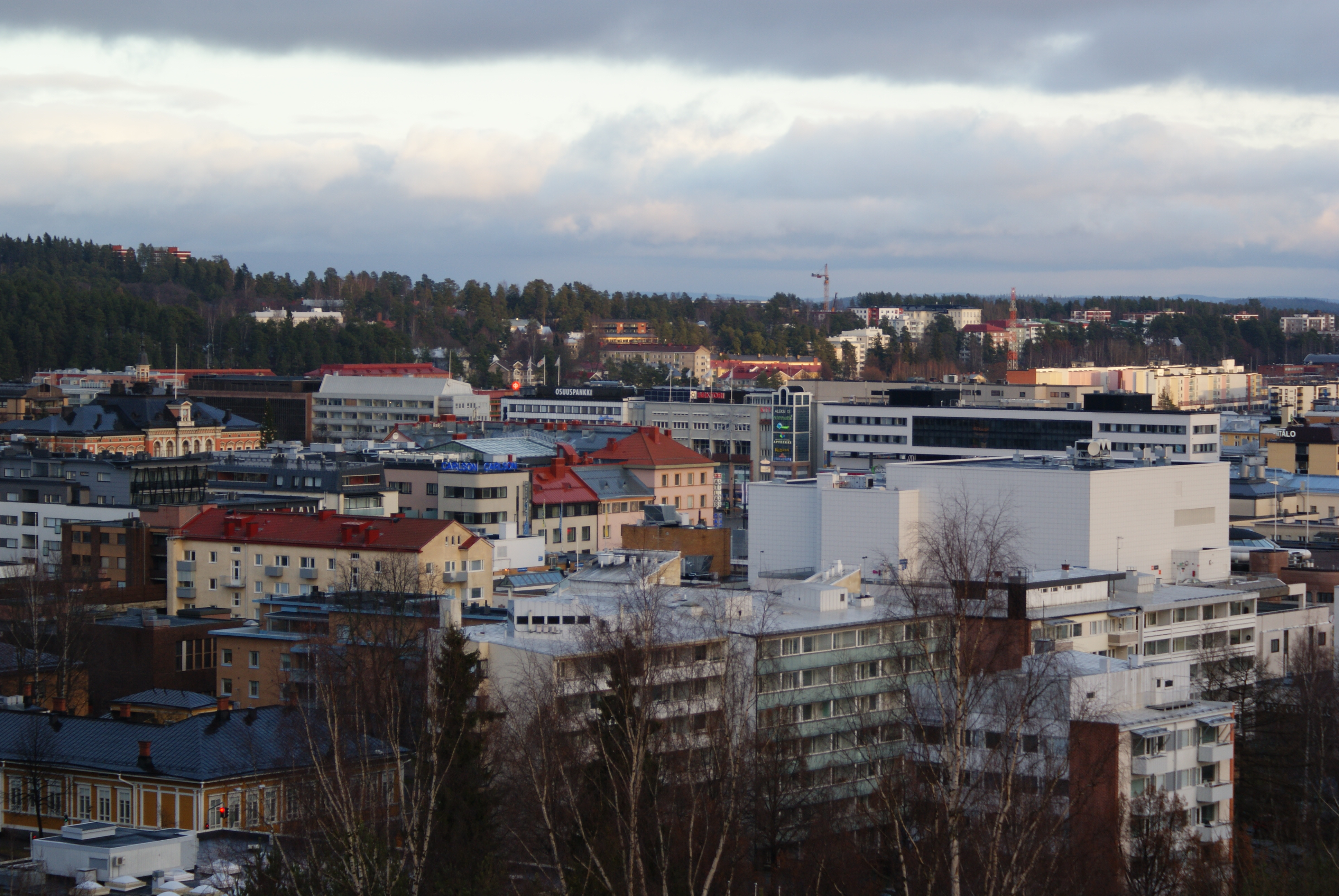 keskustaa vuonna 2015